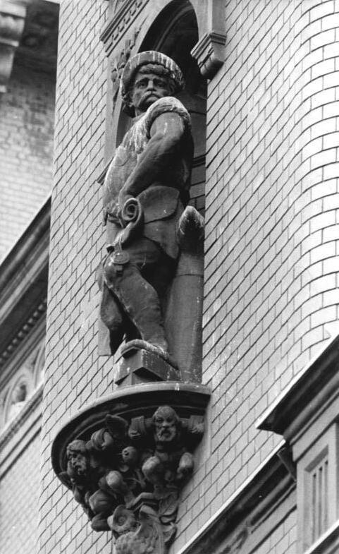 ADN-ZB-Settnik-25. 10. 84-zei-Berlin: Rathäuser-Am Pankower Rathaus steht "Die Arbeit" als zu Stein gewordene Figur. Sie ist eine von ursprünglich vier Sandsteinfiguren, genannt "Die Bürgertugenden" , die anfangs das Rathaus schmückten. Seit Kriegsende sind es nur noch drei. -Siehe auch 1984-1025-18 und 20N-"